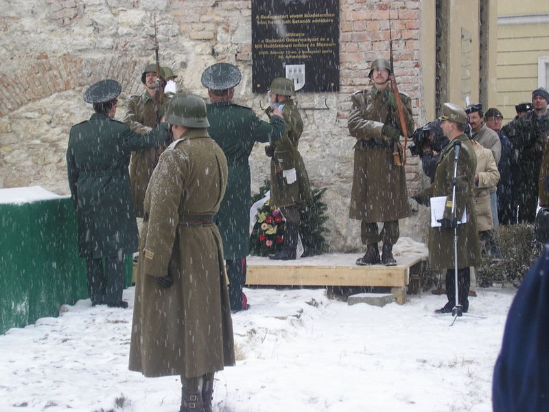 חיילי הצבא ההונגרי בבודפשט חונכים אנדרטה במלאת 60 שנה לשחרור בודפשט מידי הנאצים, ב12 בפברואר 2005.